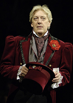 Актер театра и кино